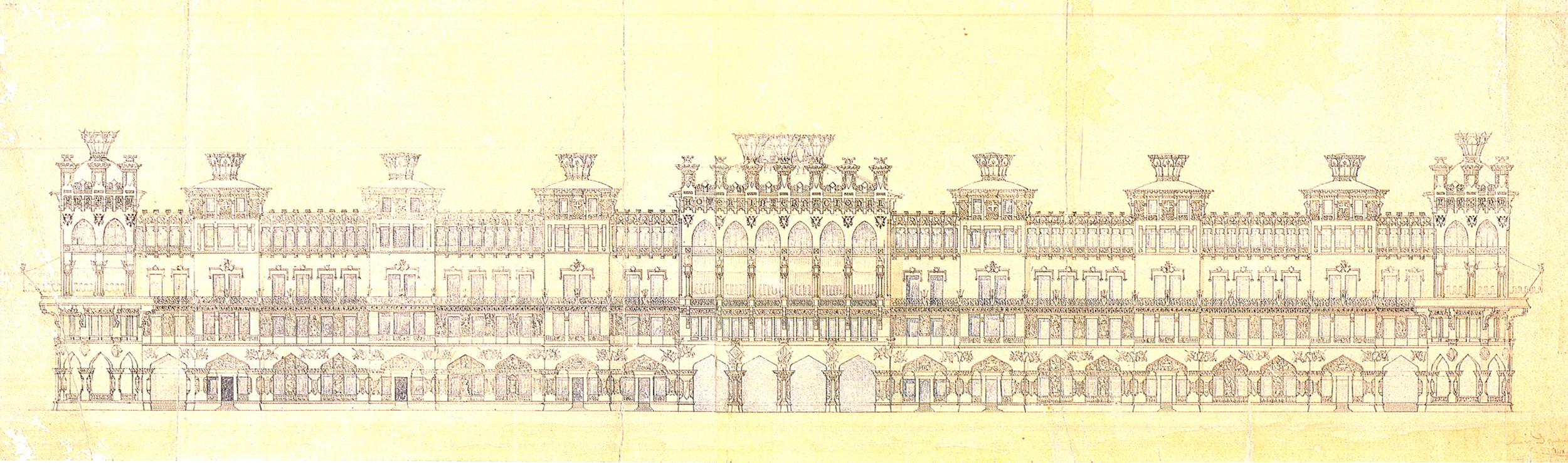 Gran Hotel Internacional Barcelona 1888 - 1889